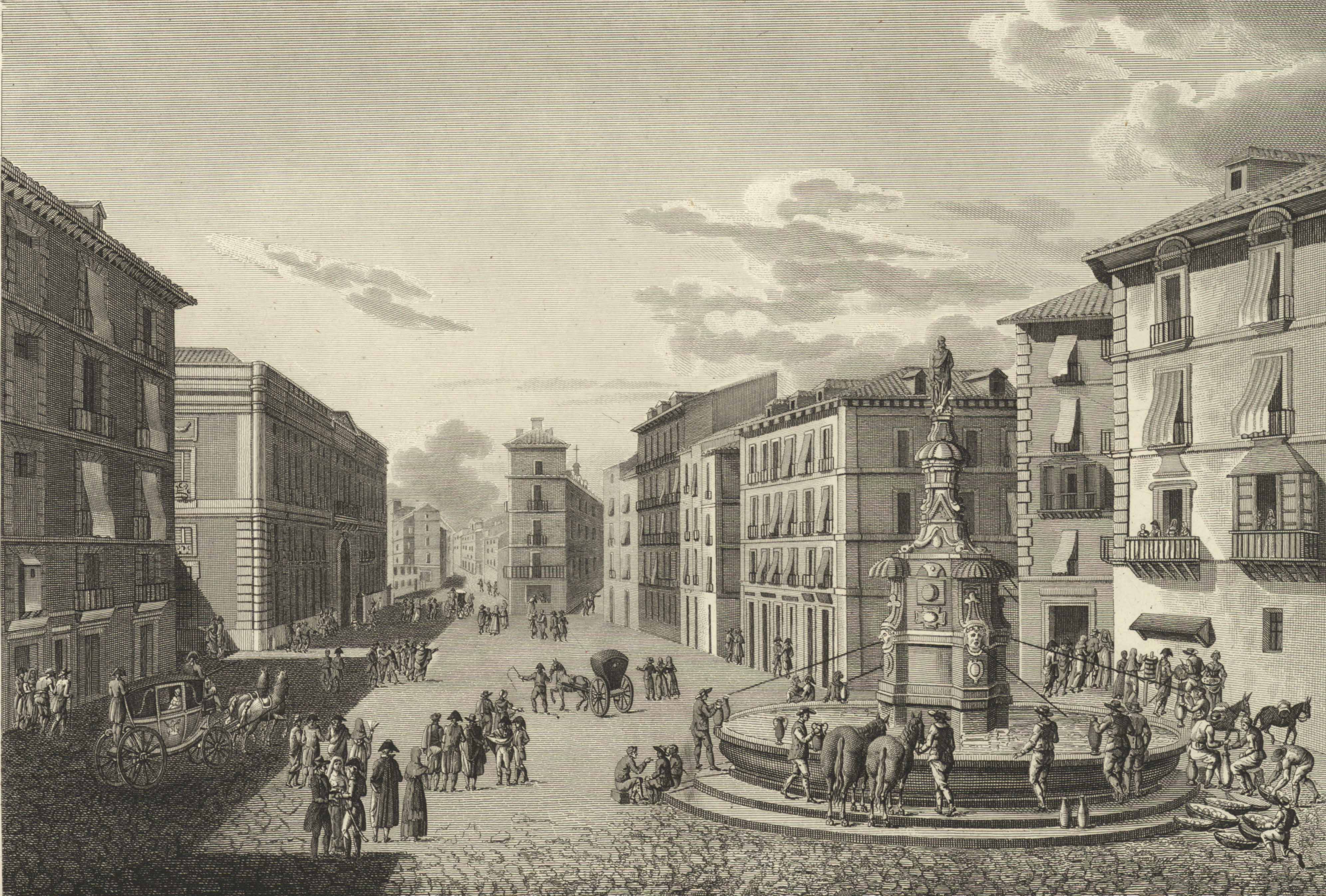 "Vista de la Calle Mayor y de la fuente del Buen Suceso".